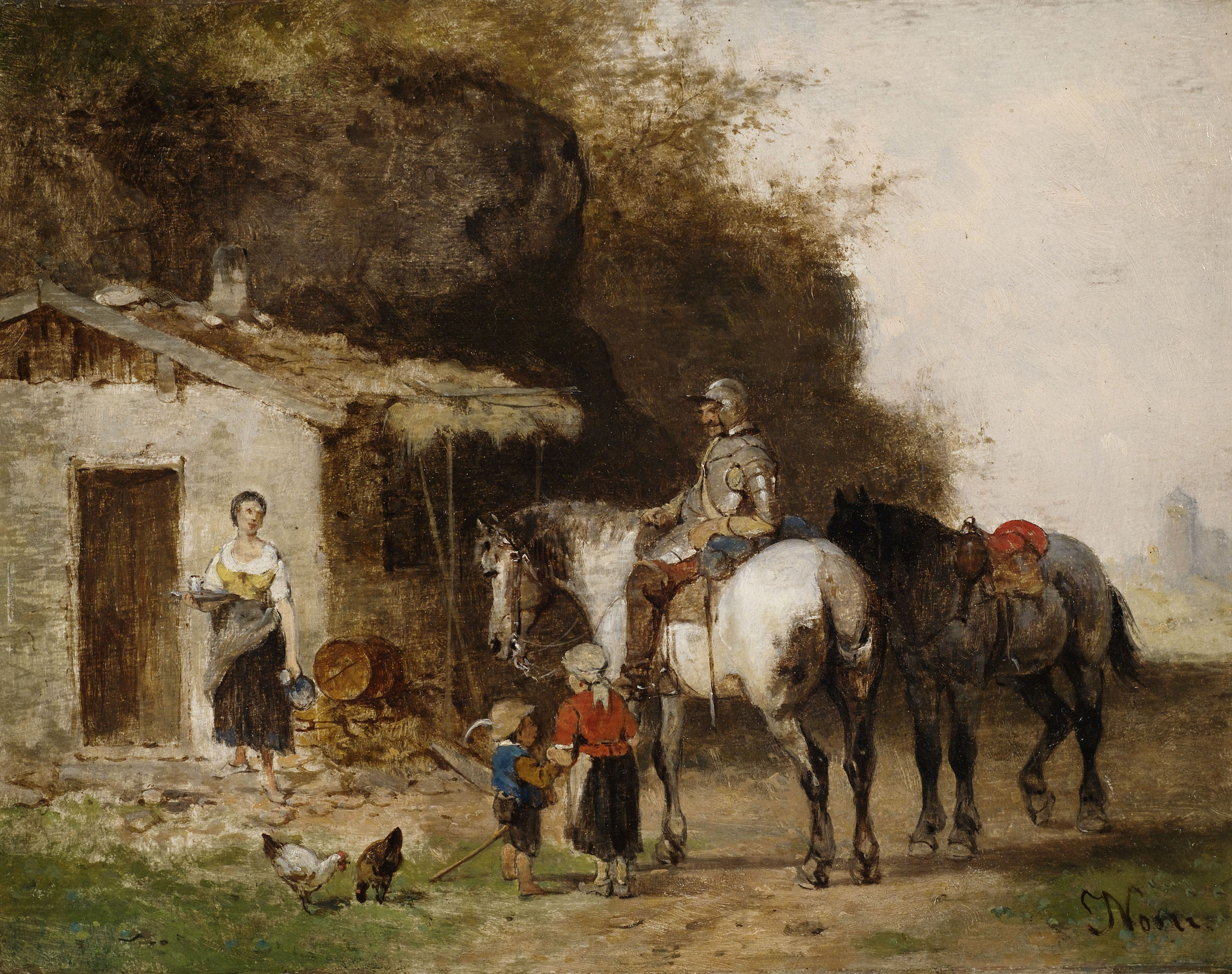 Rast. Öl auf Holz, unten rechts signiert. 21 x 27 cm